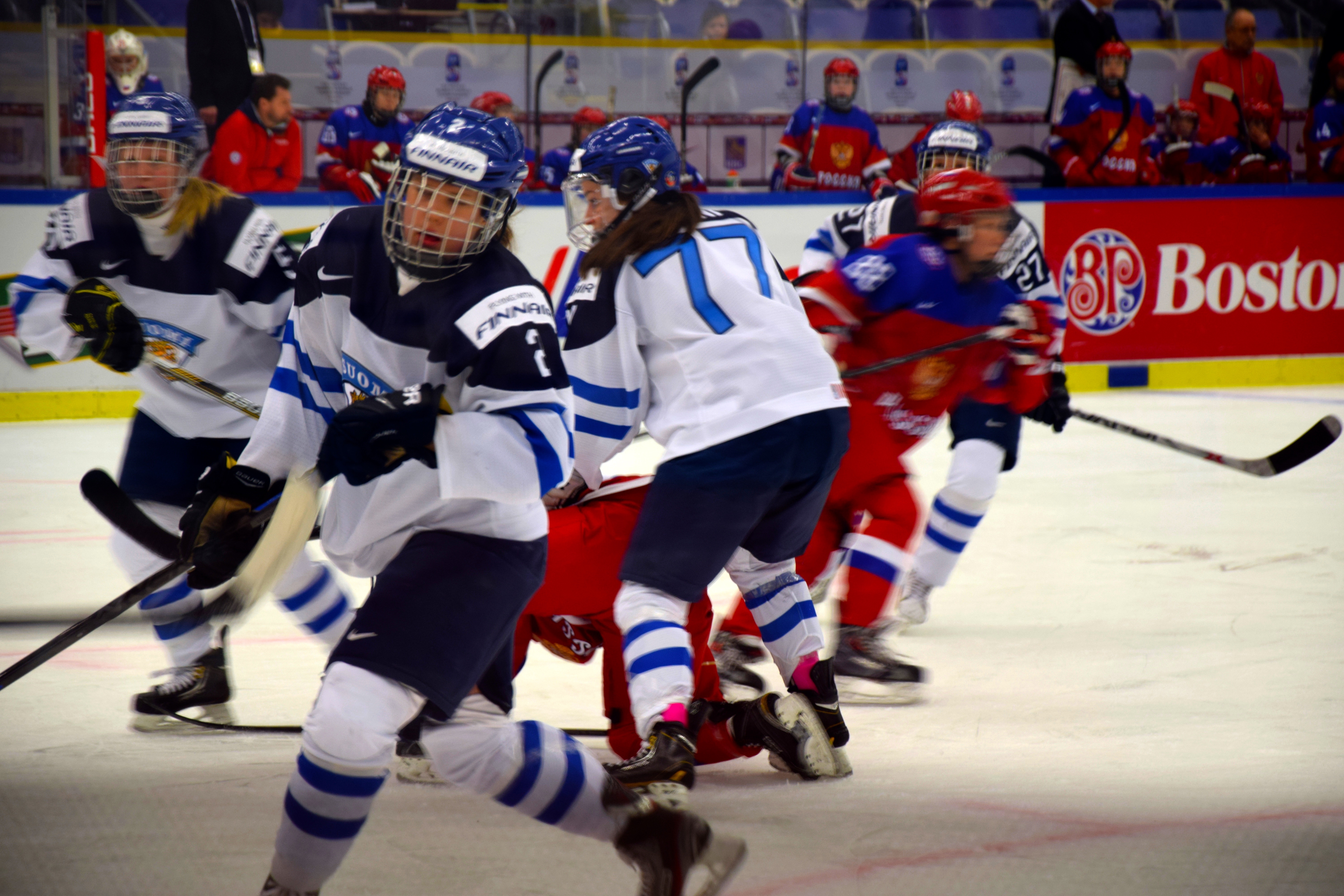 Suomi - Venäjä pronssiottelu jääkiekon naisten MM-kisoissa 2015.